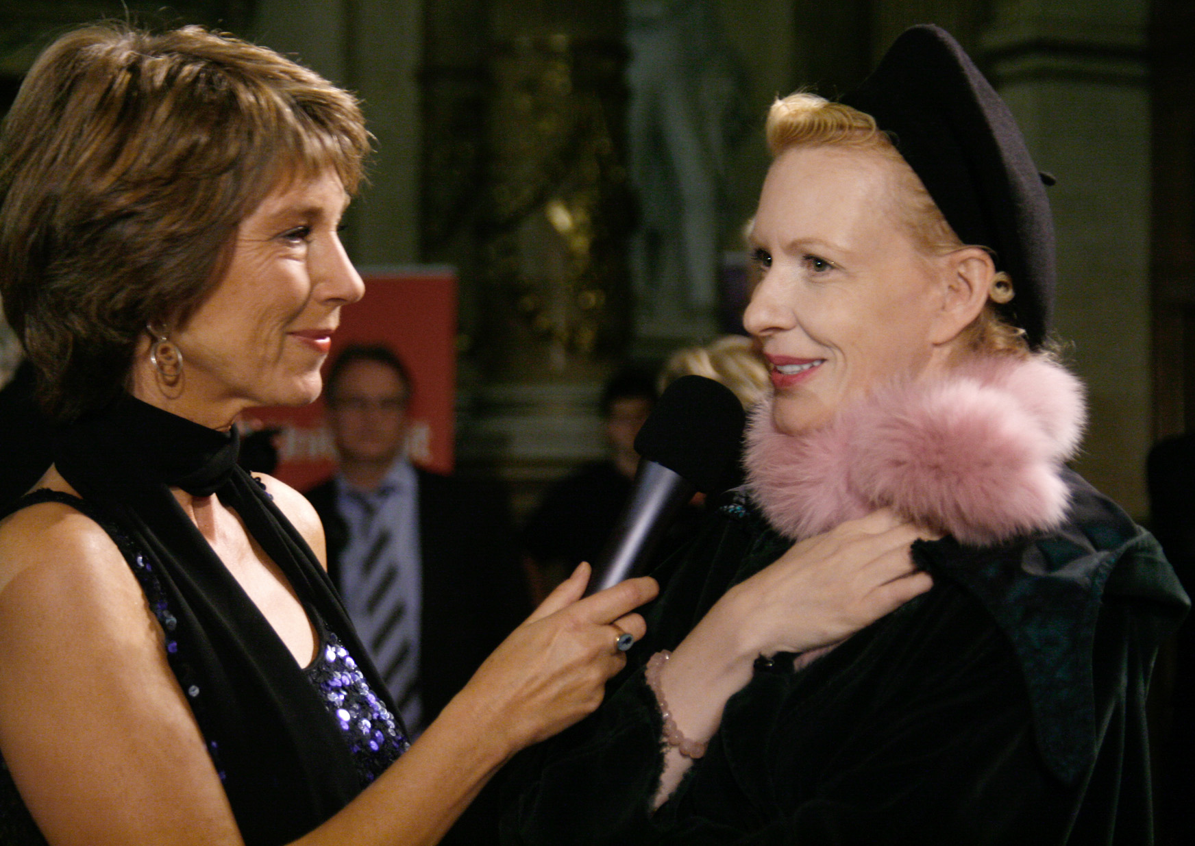 Barbara Rett interviewt Sunnyi Melles für den Österreichischen Rundfunk; Verleihung des Nestroy-Theaterpreises 2010 im Burgtheater in Wien.